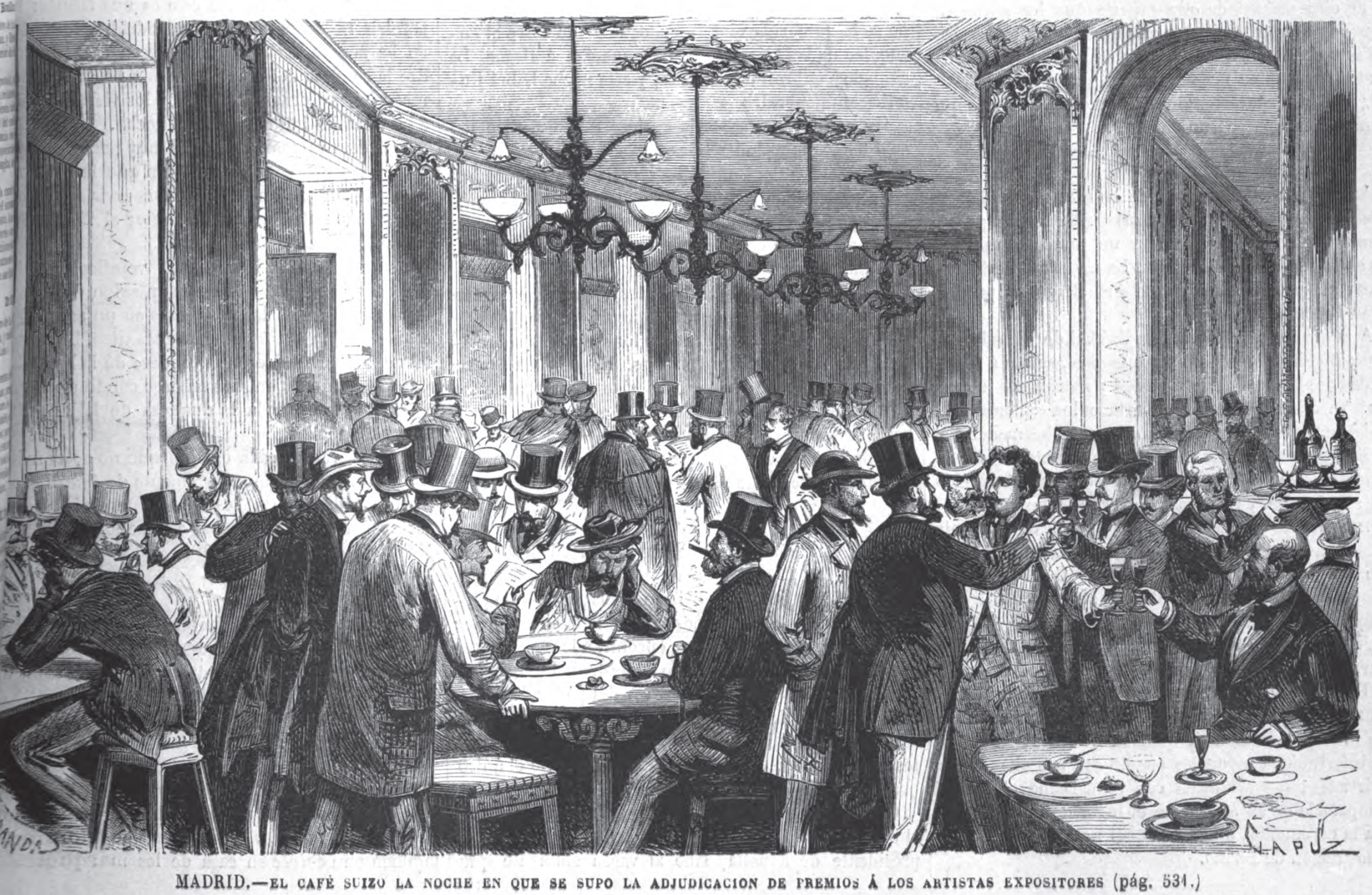 El Café Suizo la noche en que se supo la adjudicación de premios á los artistas expositores.